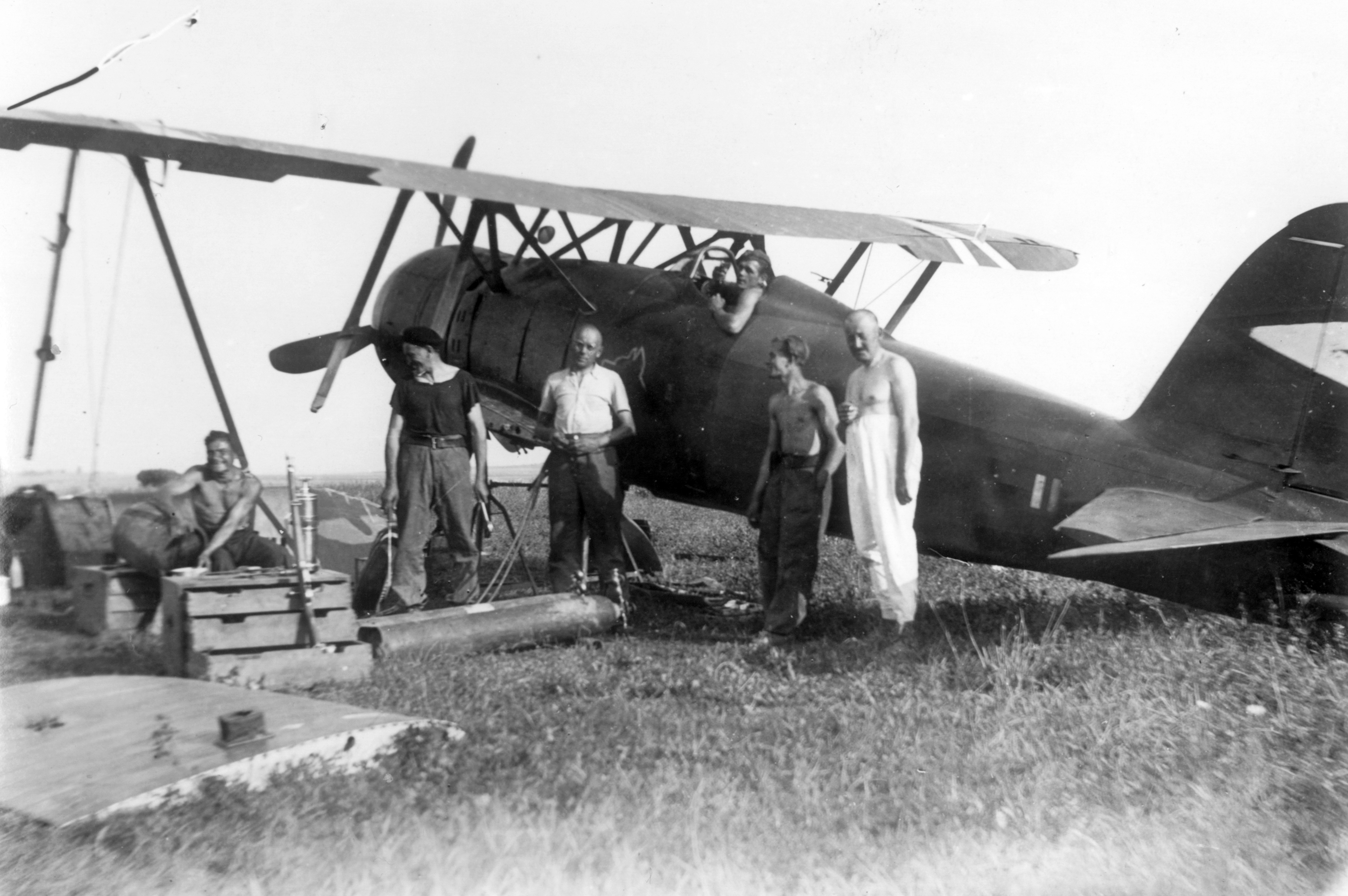 a Magyar Királyi Honvéd Légierő Fiat Cr-42 típusú vadászgépének javítása. Location: Ukraine Tags: airplane, Fiat-brand, fighter plane, Royal Hungarian Air Force, Italian brand, second World War, eastern front Title: a Magyar Királyi Honvéd Légierő Fiat Cr-42 típusú vadászgépének javítása.